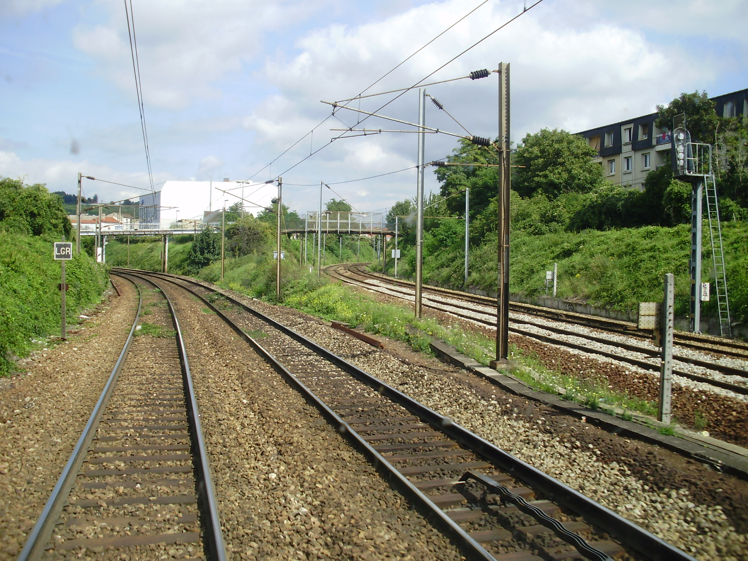 Séparation au nord de la gare d'Argenteuil, Val-d'Oise, France, entre, à gauche, la ligne de Paris-Saint-Lazare à Mantes-Station via Conflans-Sainte-Honorine (groupe VI) et, à droite, celle de Paris-Saint-Lazare à Ermont - Eaubonne (groupe IV), vue depuis la cabine de conduite d'une rame se dirigeant vers Conflans et Pontoise